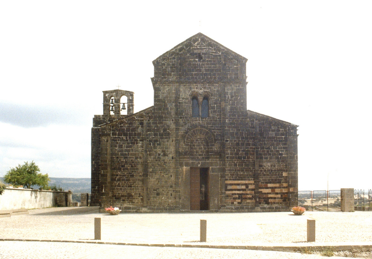 Chiesa di Santa Maria del Regno (XII secolo), Ardara (SS)